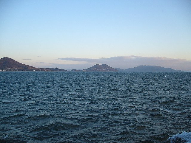 直島諸島 左から女木島、男木島、豊島 「第2しょうどしま丸」から